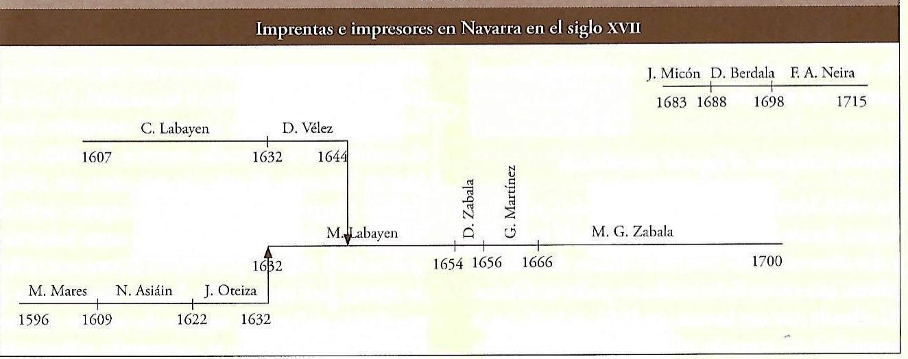 Imprentas navarras en el siglo XVII